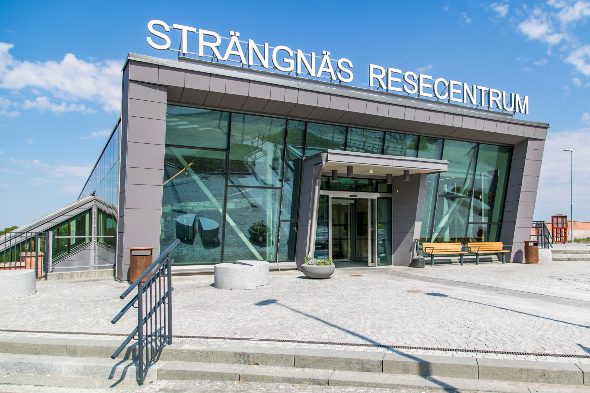 Strängnäs resecentrum, Strängnäs, Södermanlands län, Sverige.